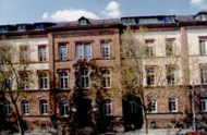 Ansicht des Gebäudes Netzwerk Alternsforschung